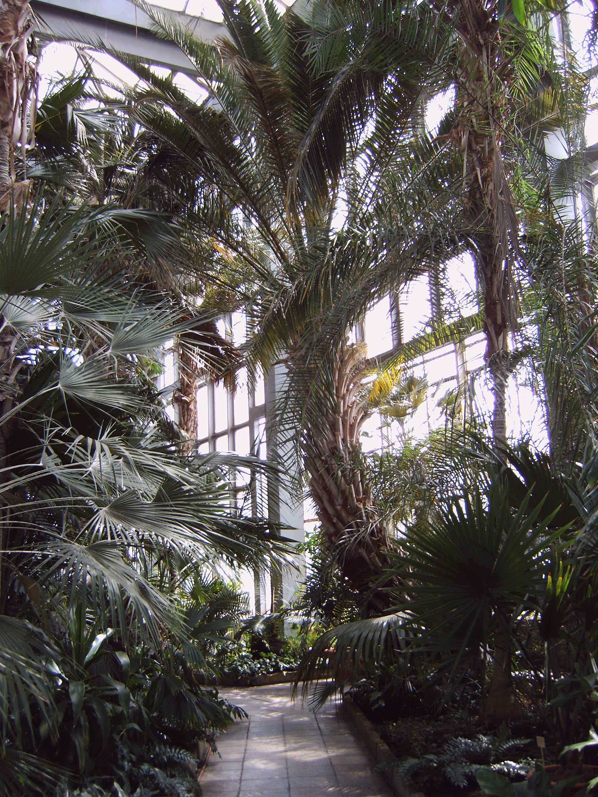 Gruson-Gewächshäuser in Magdeburg, Palmenhaus Bild aufgenommen am 28.5.2006